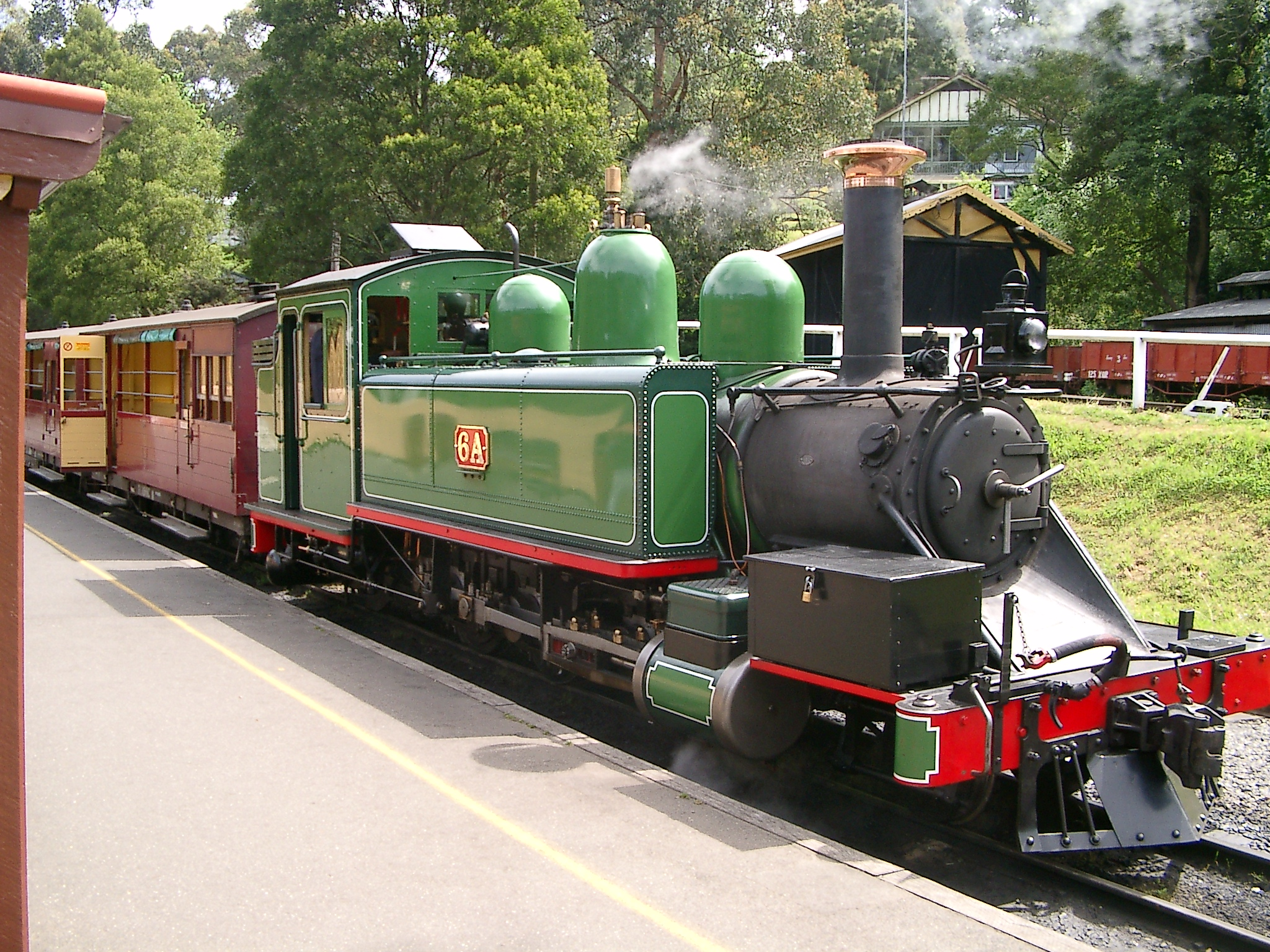 Foto: Lok 6A der Puffing Billy Railway in der Station von Belgrave Eigenes Foto vom 10.11.2002